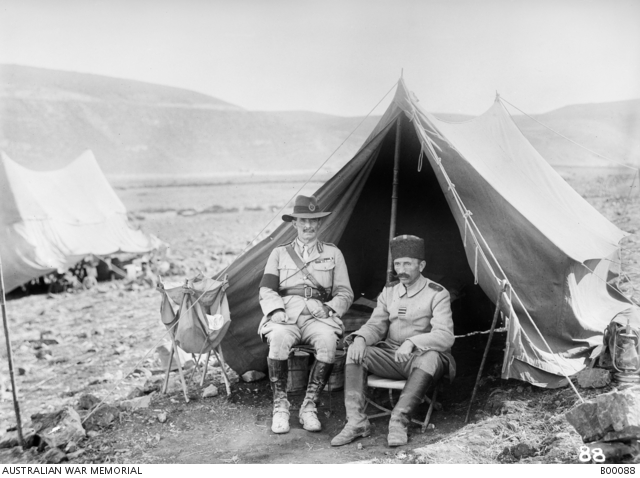 מייג'ור גנרל אדוארד צ'ייטור עם עלי ביי וואהאבי, מפקד הארמיה ה-4 הטורקית שנשבה בקרב עבר הירדן השלישי